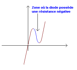 Courbe d'une diode à effet tunnel. Dessin personnel. Catégorie:Diode